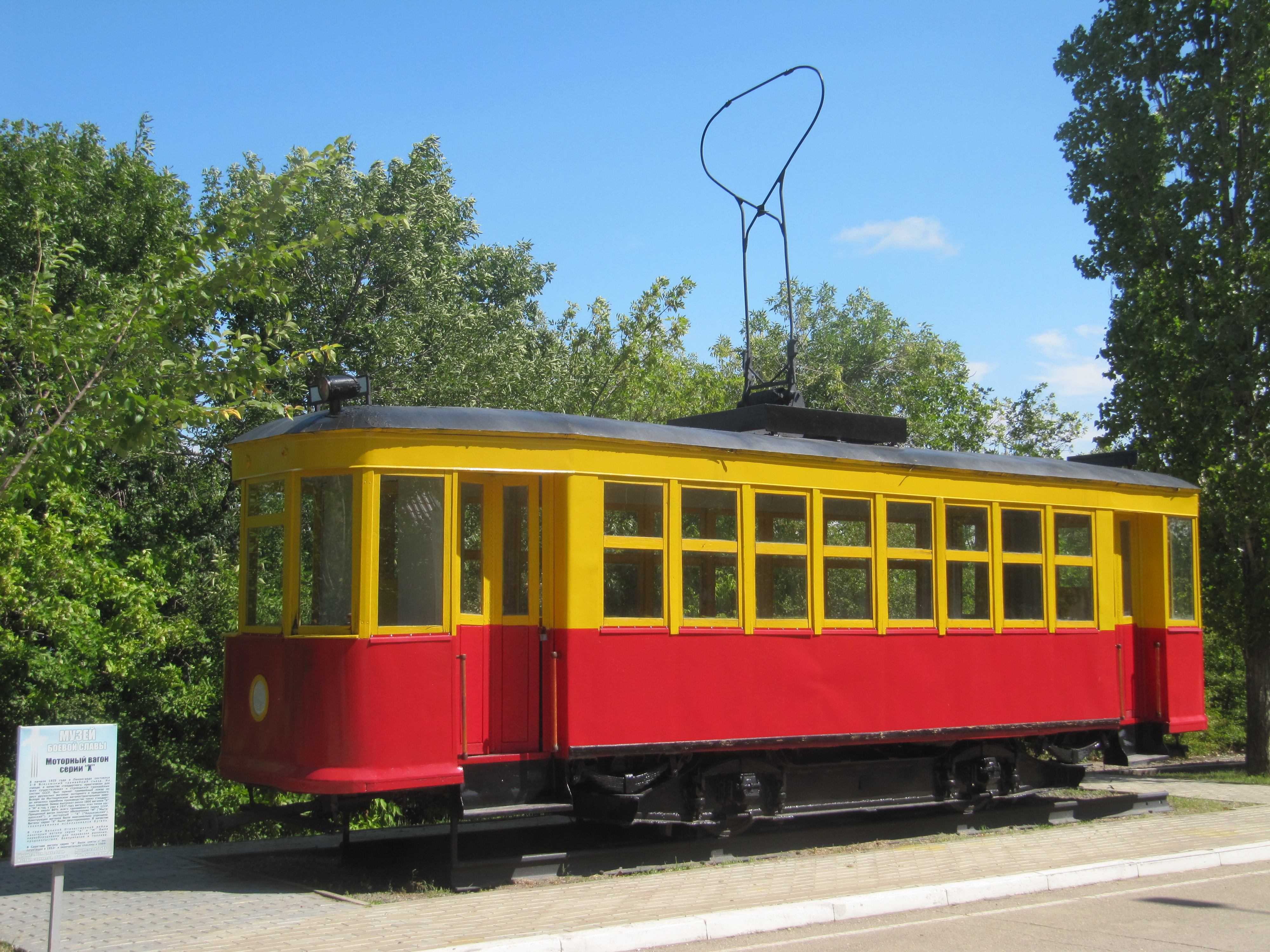 Трамвай: Моторный вагон серии Х, Парк Победы, Саратов.